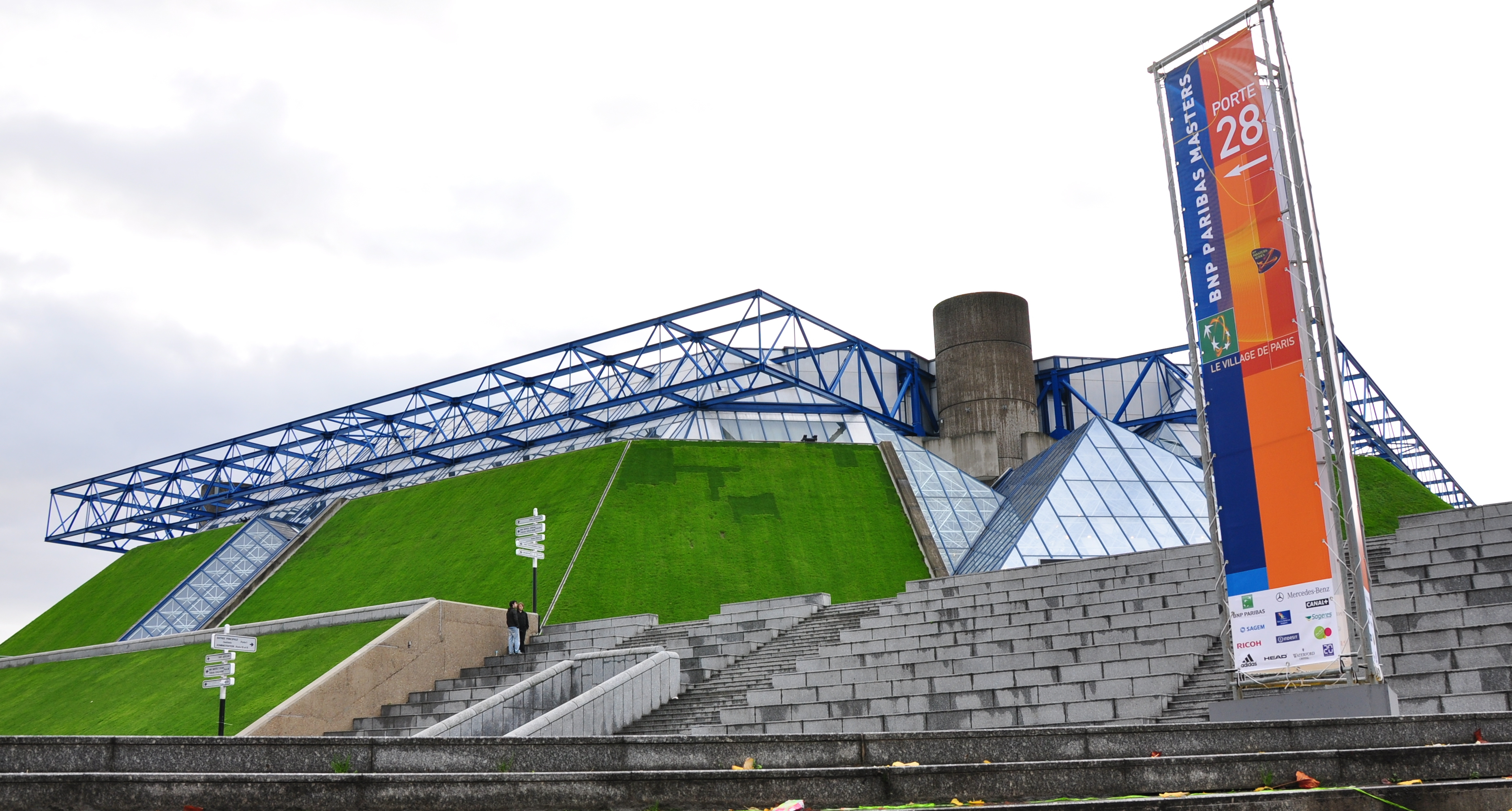 ベルシー体育館